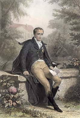 Incisione su acciaio su disegno di Karl Girardet, inciso da Paul Girardet, 1837